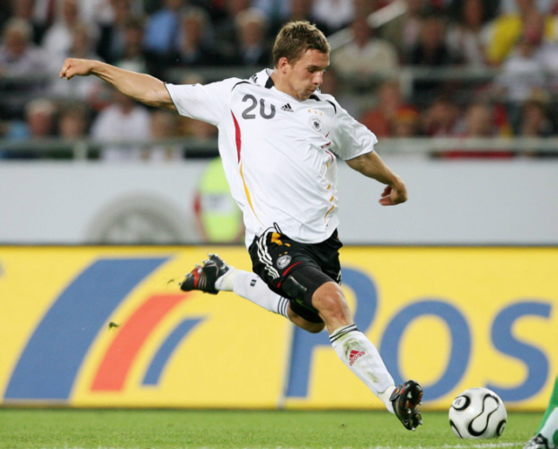 Imagen de Podolski golpeando el balón